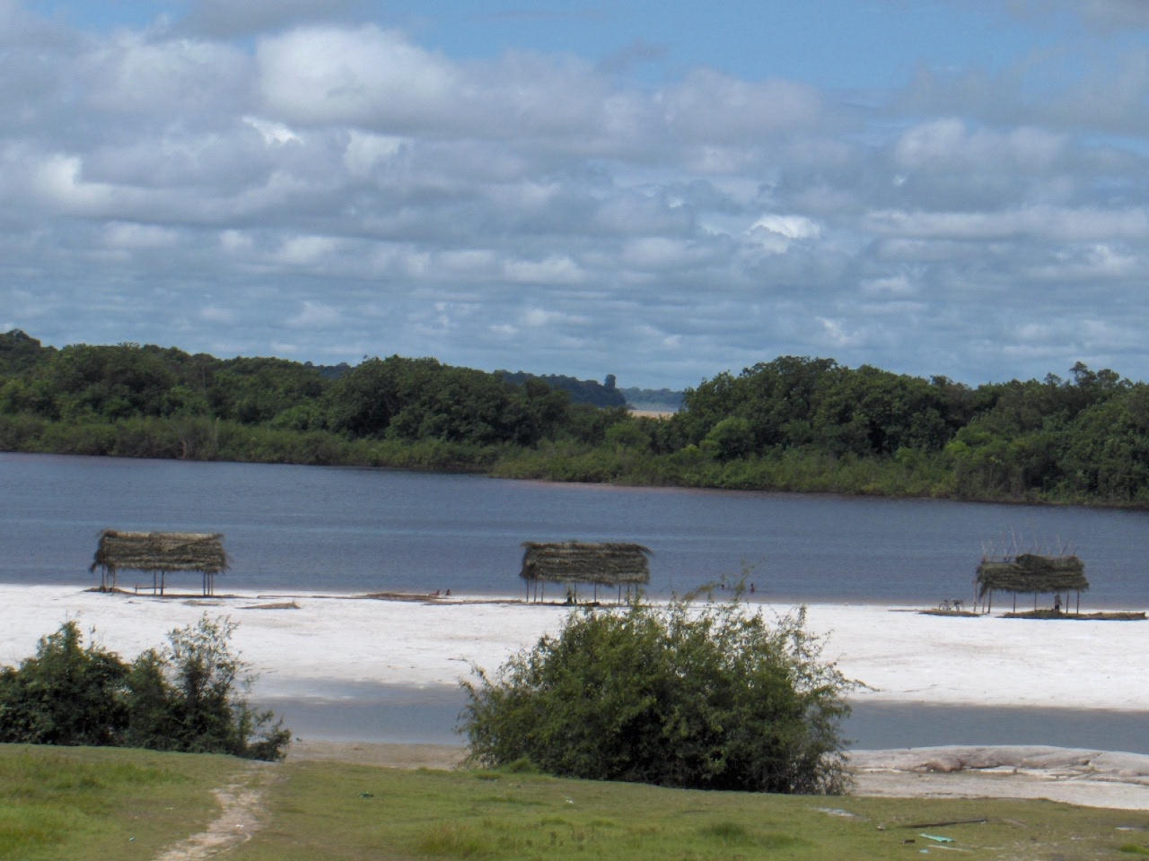 Rio Atabapo (river), en Maracoa Estado Amazonas-Venezuela